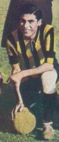 Ramón Luna